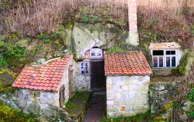 Höhlenwohnung in Langenstein (Harzvorland)